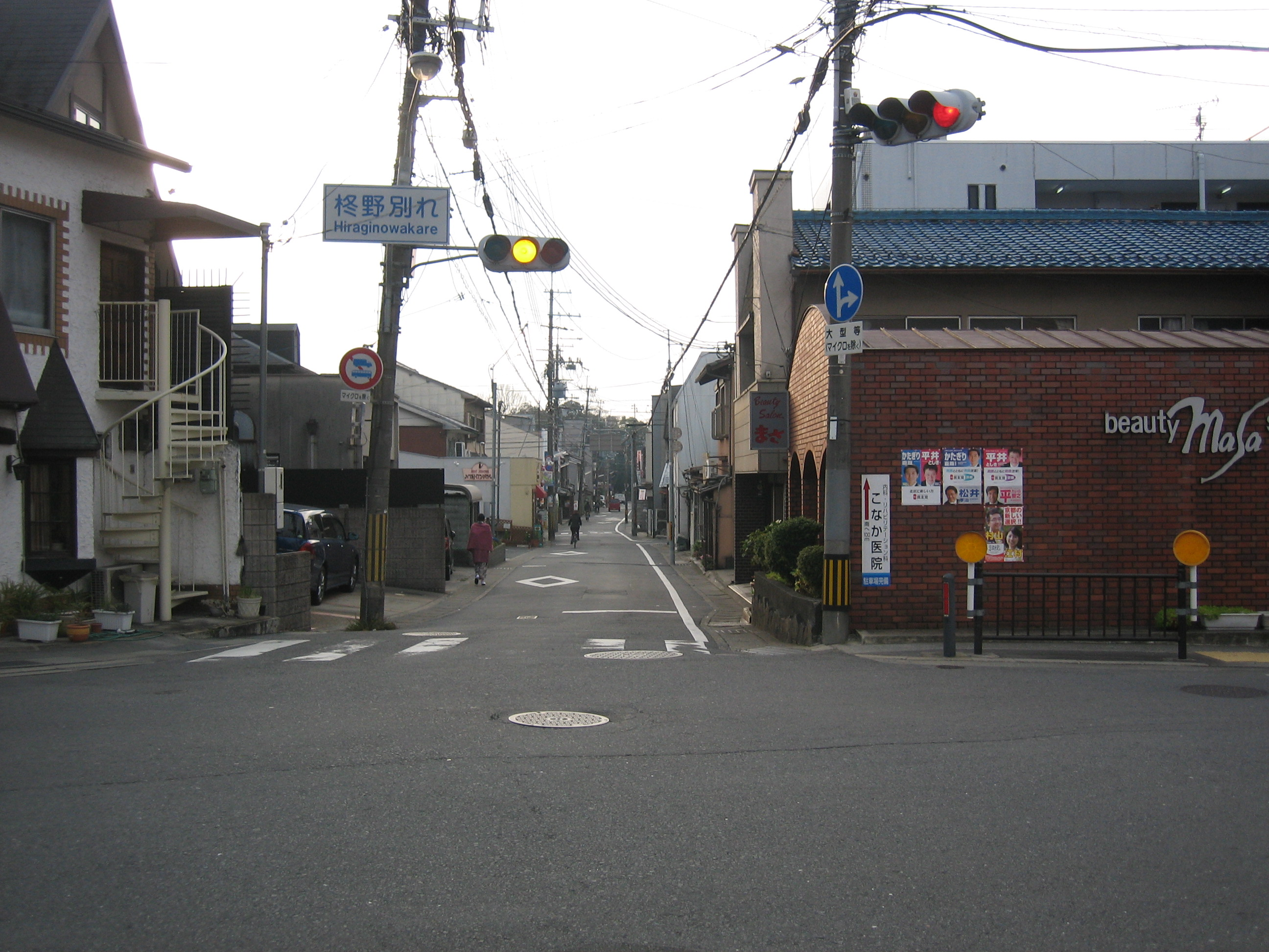 京都府道61号京都京北線を柊野別れ交差点北側から撮影